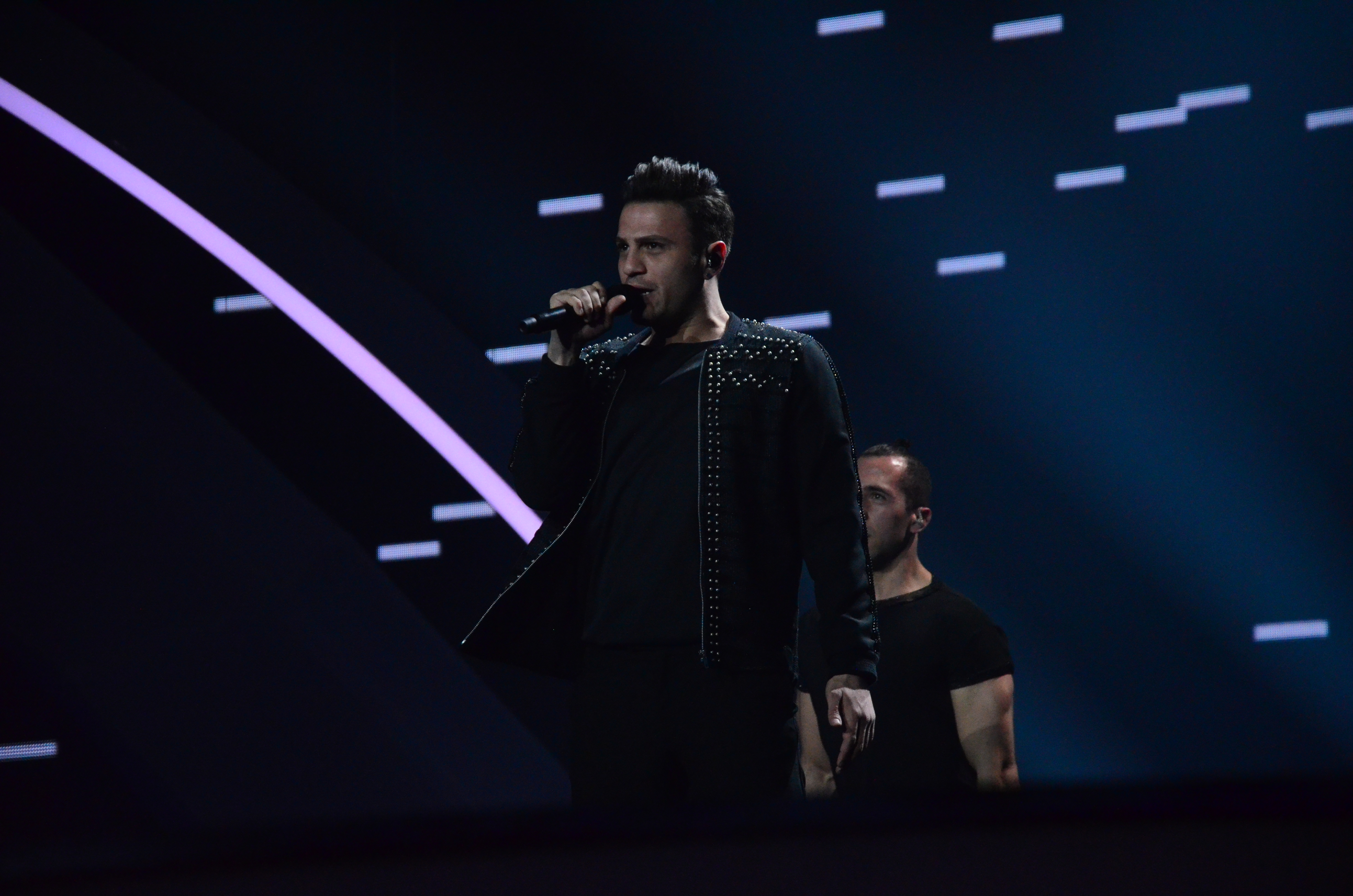 The making of this file was supported by Wikimedia Ukraine.